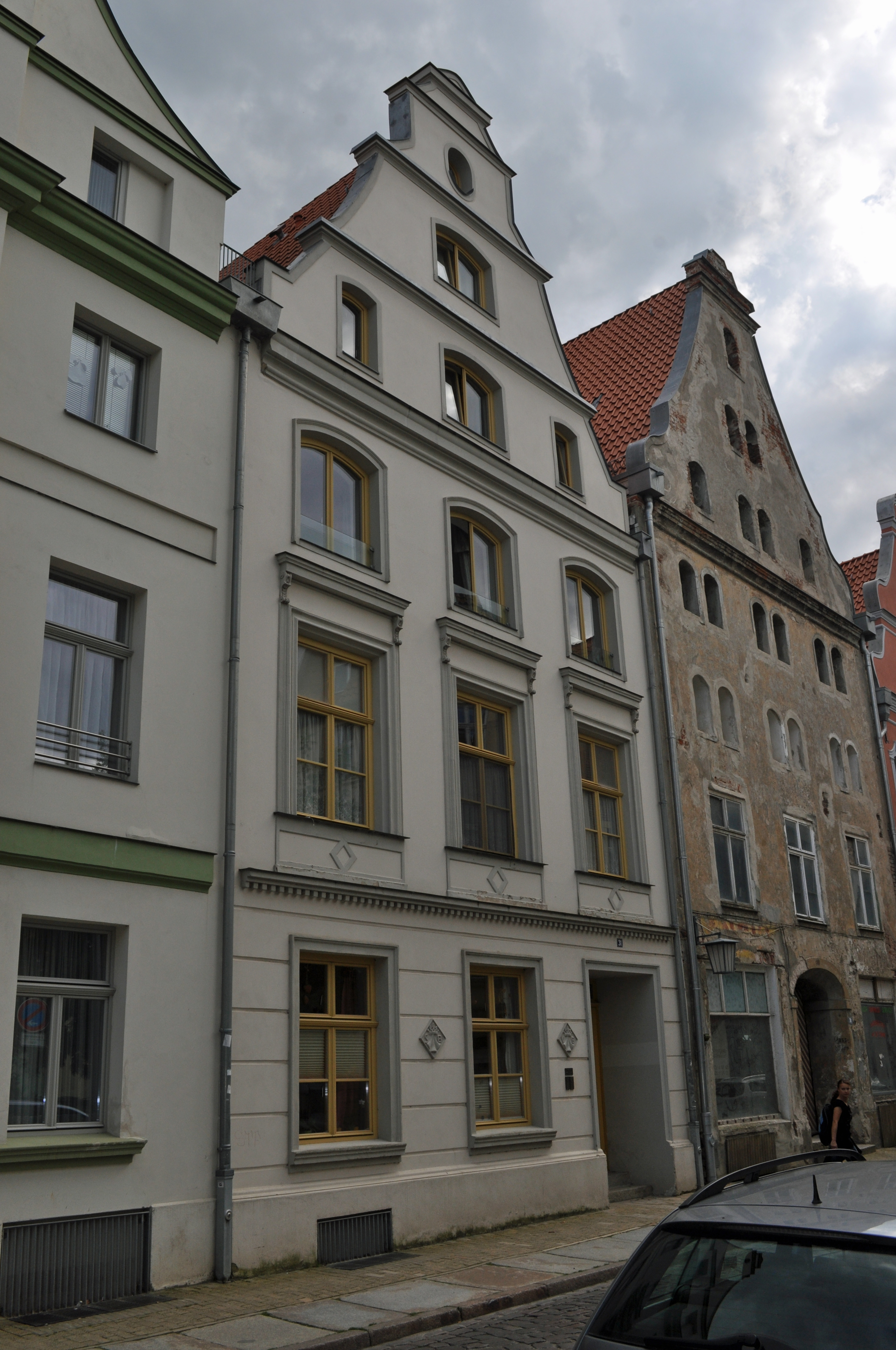 Das Foto zeigt ein Haus (bzw. Details des Hauses) in der Frankenstraße in Stralsund, Deutschland. Die Hausnummer steht im Dateinamen. Aufgenommen am 19. Juli 2011 vom Benutzer:Klugschnacker.